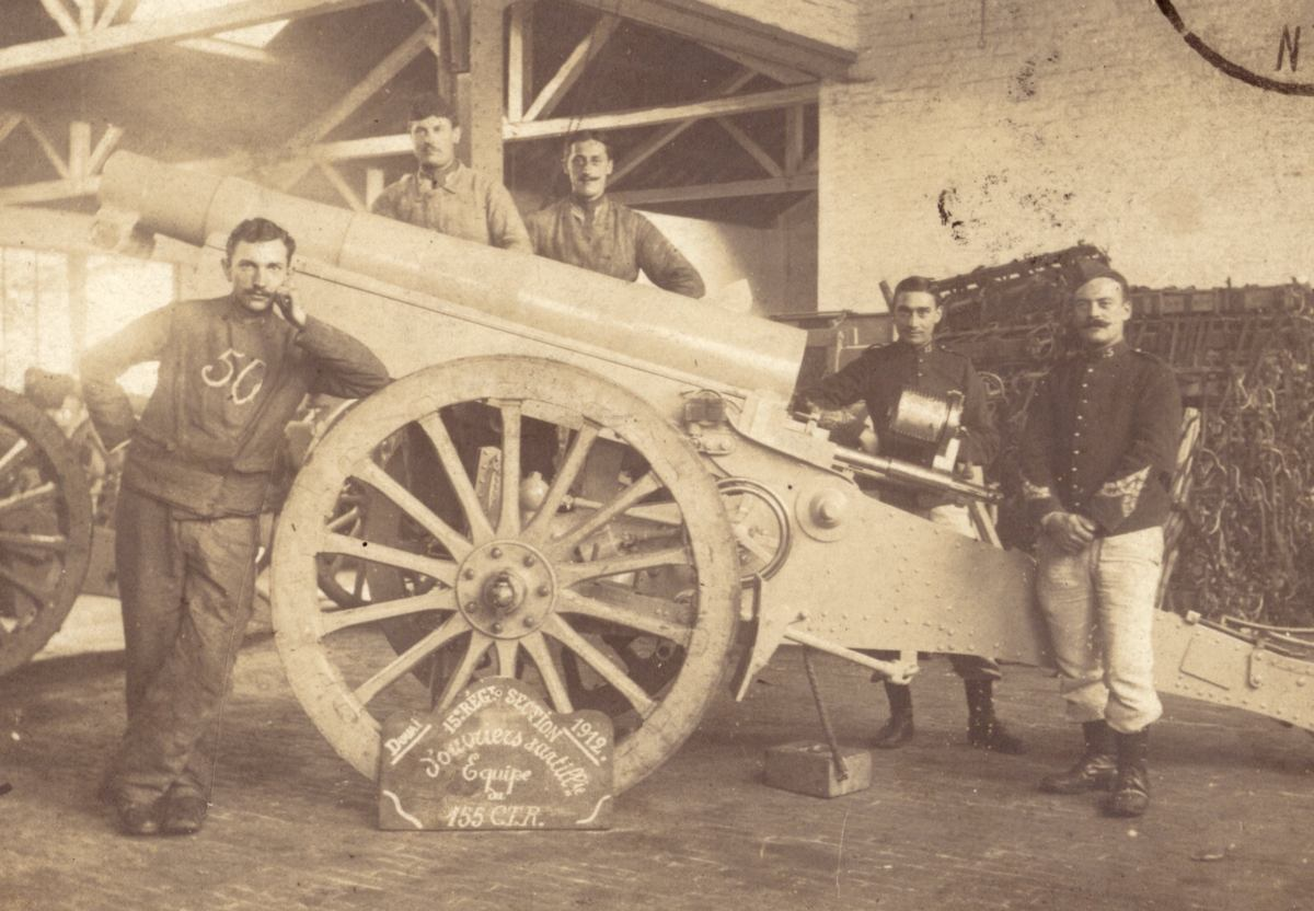 Le 15ème régiment d'artillerie basé à Douai (Nord) en 1912 participera à la première guerre mondiale